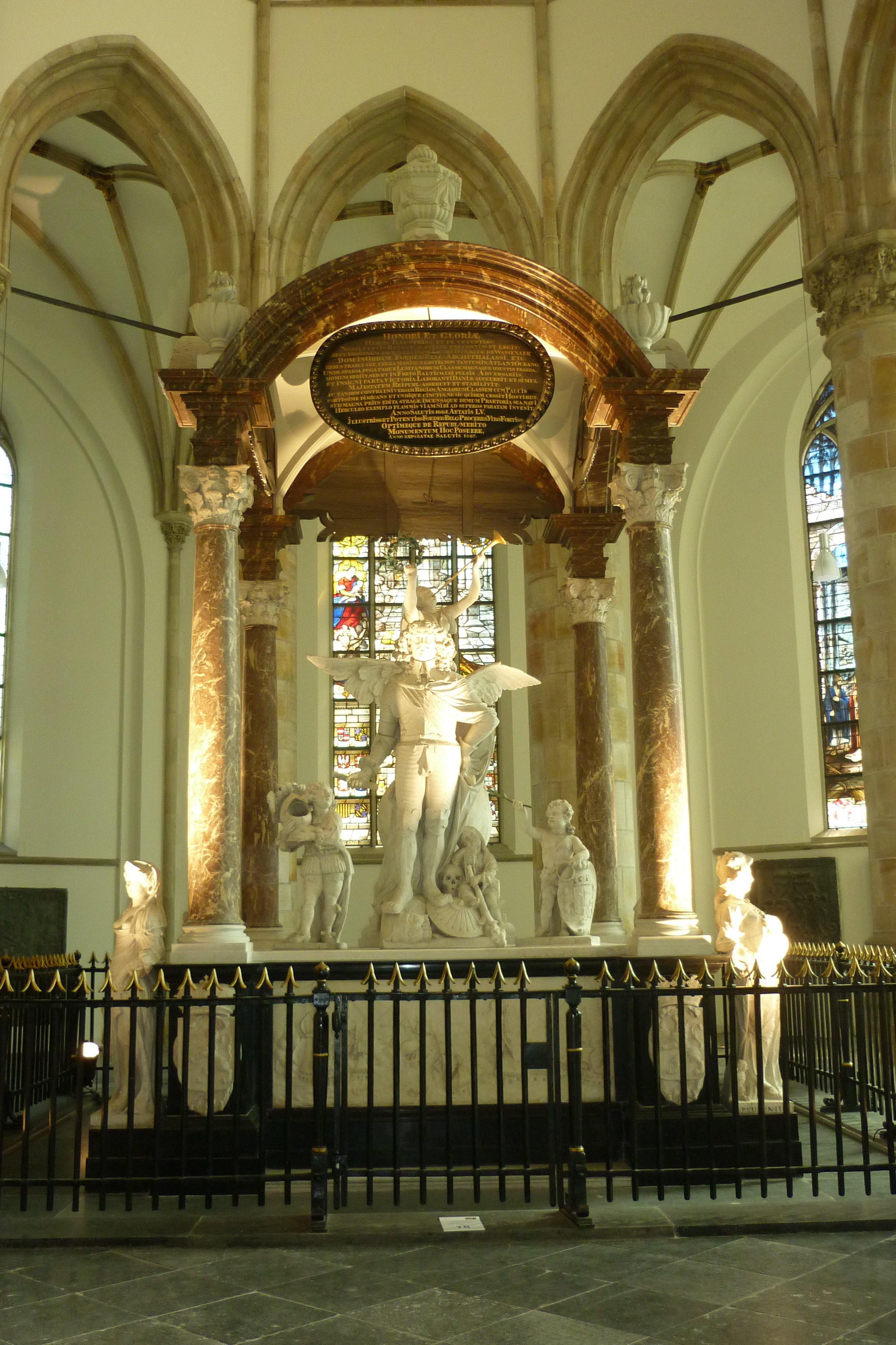 Praalgraf van admiraal van Wassenaer van Obdam in de Grote Kerk in Den Haag